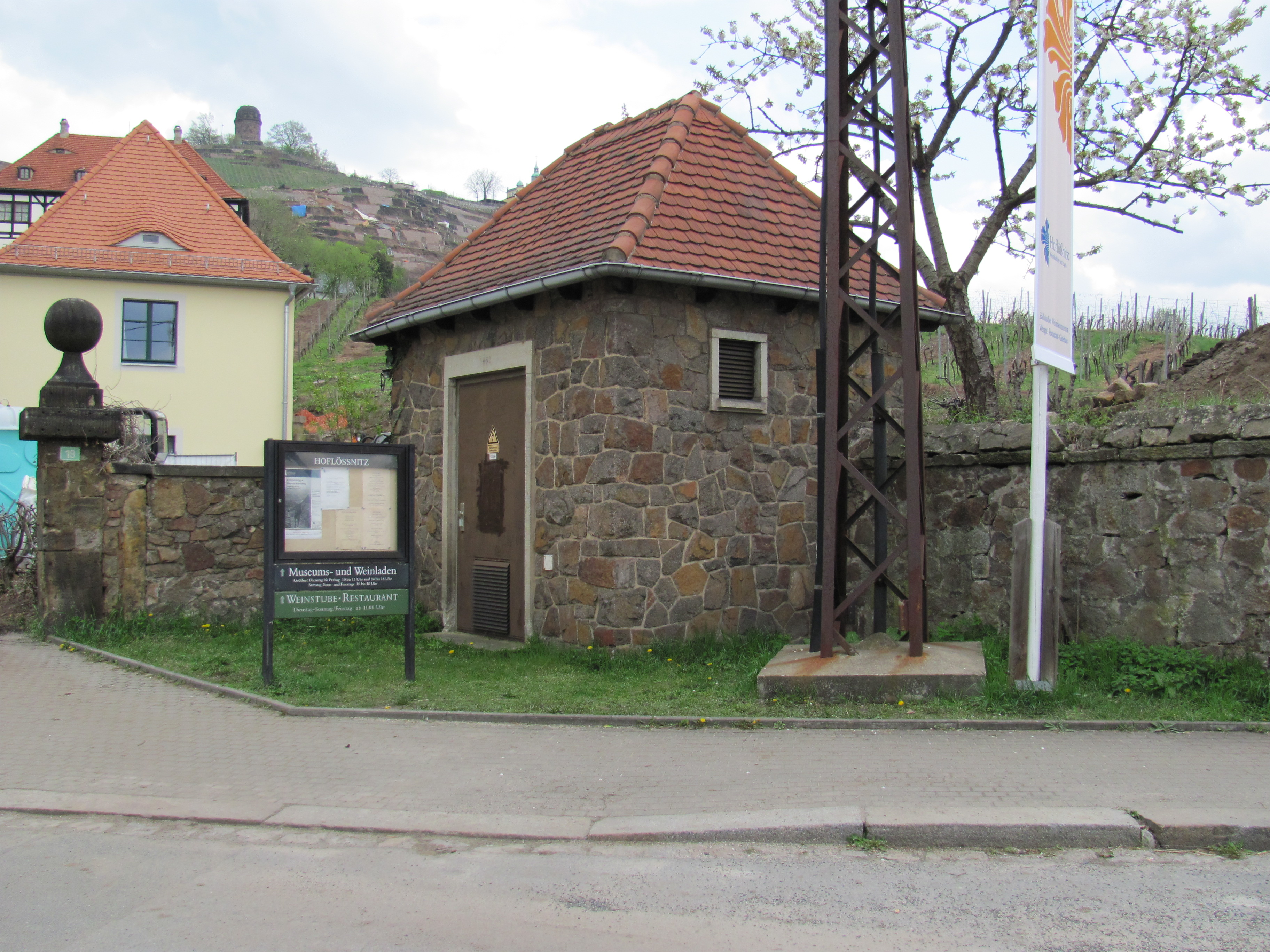 Radebeul, Trafostation Hoflößnitz (Teil von Winzerhaus, ehemaliges Backhaus und Toranlage der Hoflößnitz)